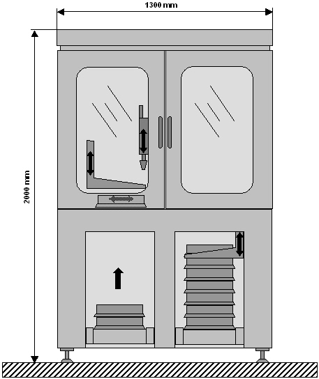 Palettiersystem/Magaziniersystem SPEED-Line in der Vorderansicht